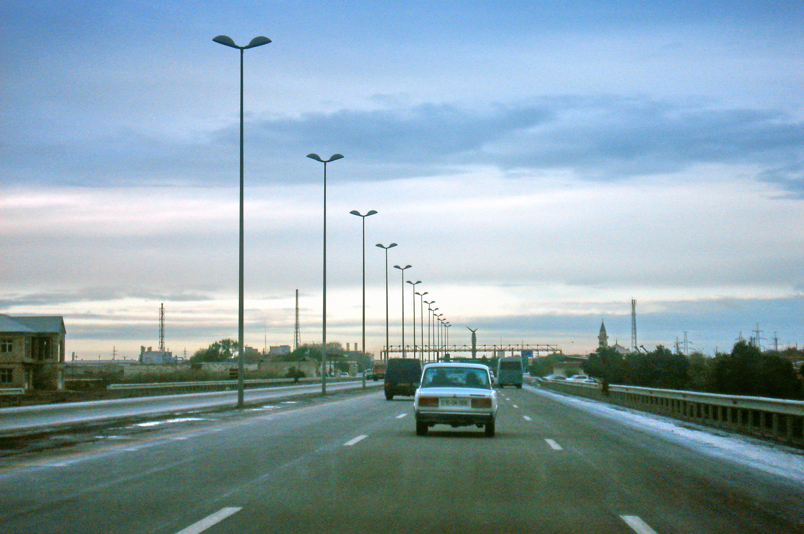 Шоссе в нескольких километрах от Сумгаита